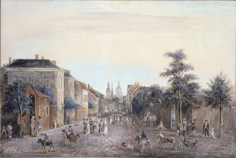 Drottninggatan 1808. Kopia utförd av Einar Uggla Bildkonst Konstnär: Martin, Elias Material och teknik: Gouache Underlag: Papper Mått i mm: 610x915 Referenser Upphov: Martin, Elias (1739-1818). Tid: 1808 Beteckning: Inventarienummer SSM 3554